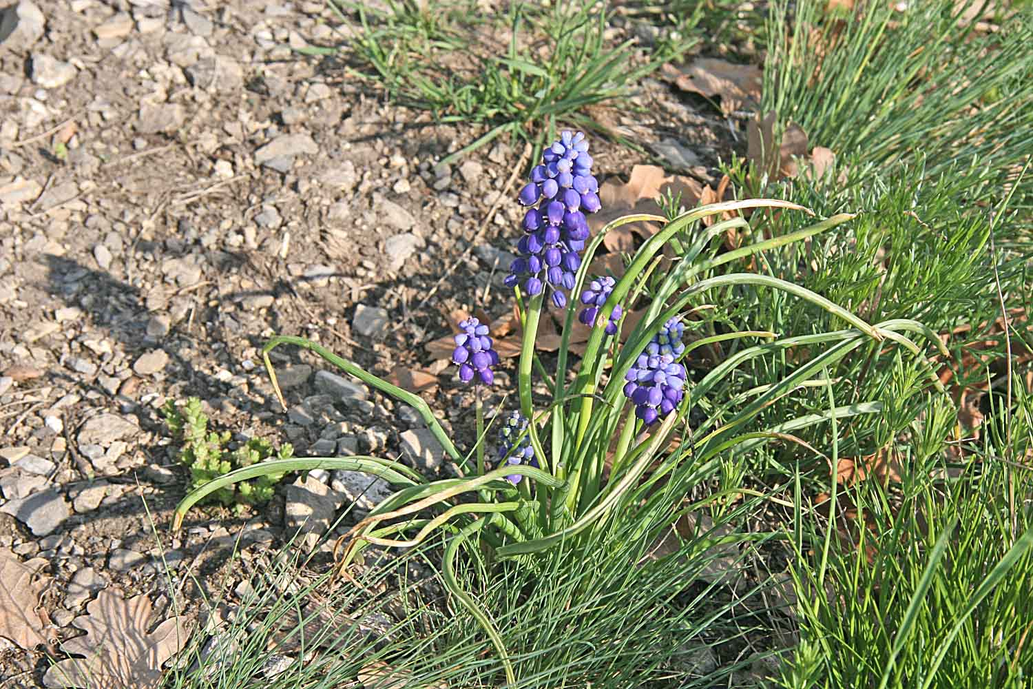 Muscari neglectum from Nature reserve Kulivá hora near Prag autor:Prazak